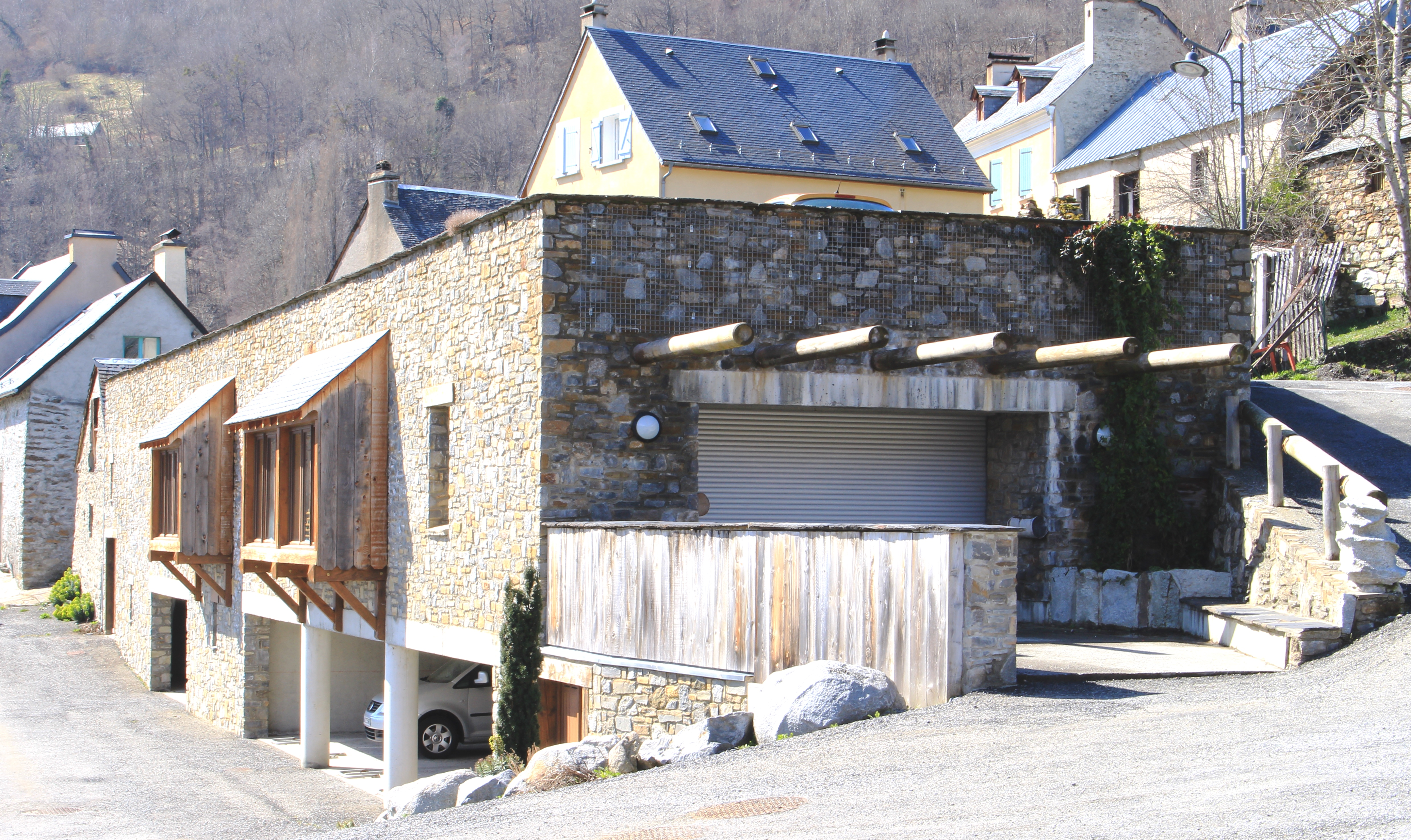 Salle des fêtes de Grust (Hautes-Pyrénées)